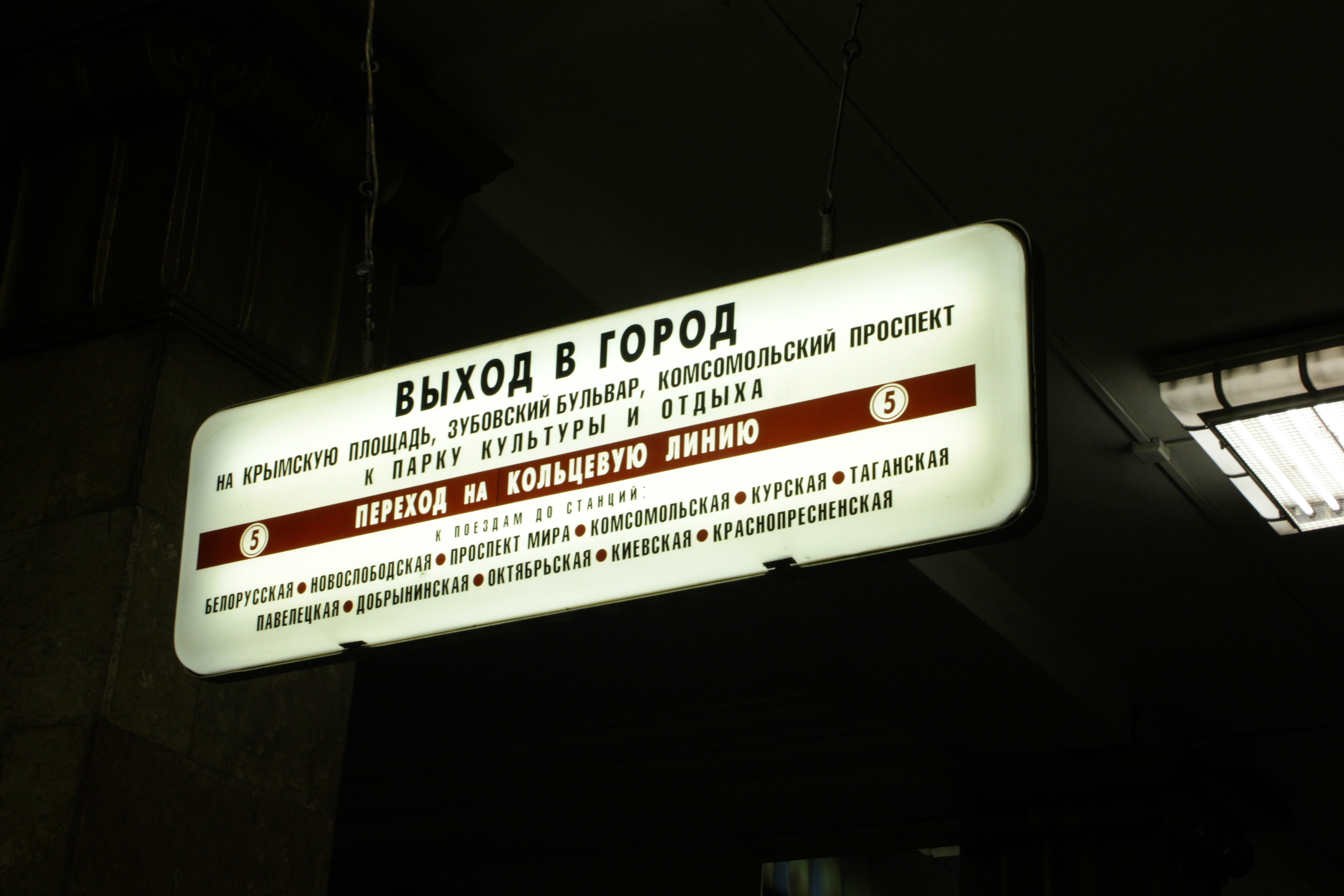 Park Kultury - radialnaya (Парк Культуры - радиальная)